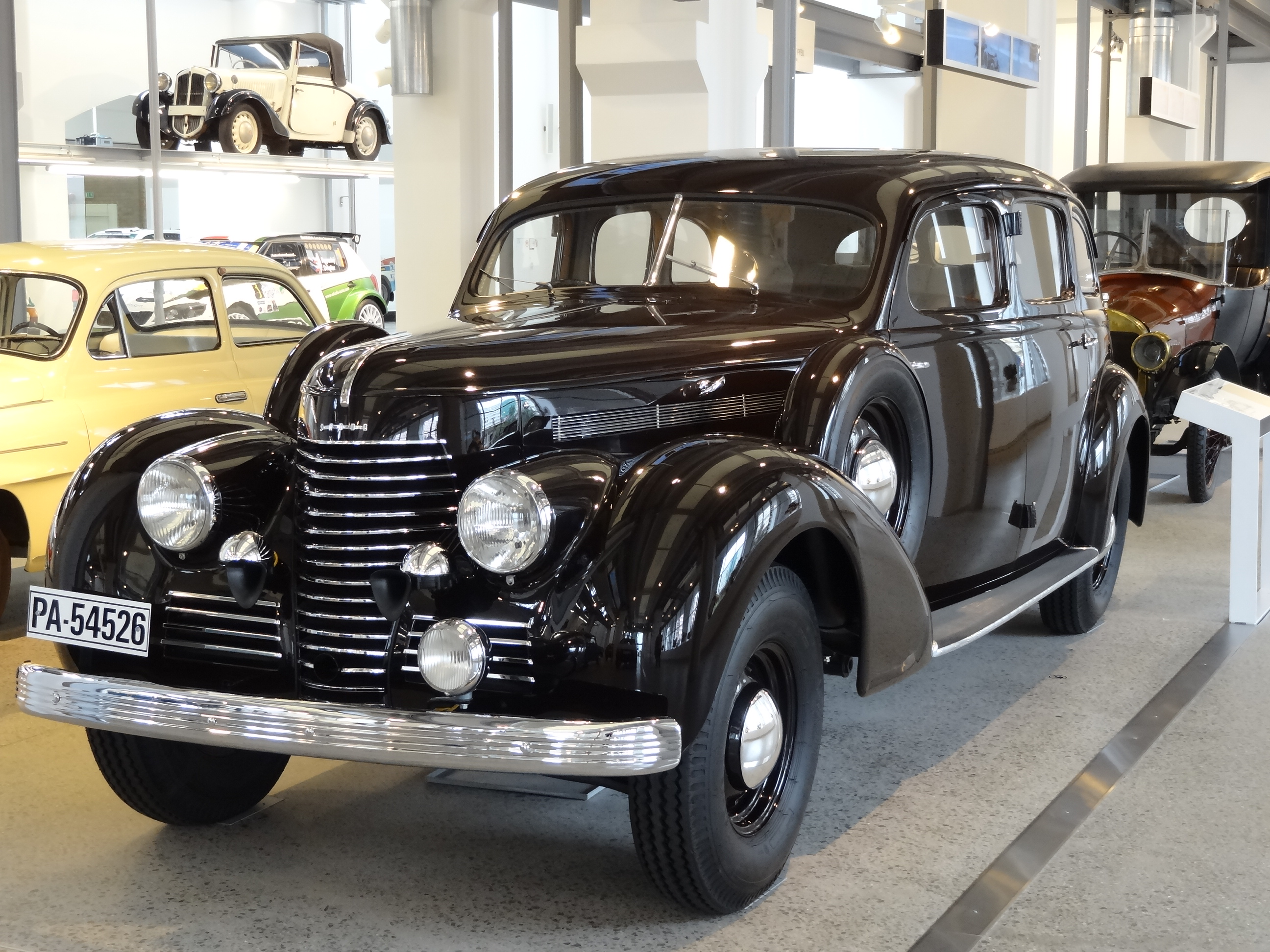 "Er wird als luxuriöses Flagschiff der Modellpalette entworfen: derSkoda Superb 4000 mit V8 Zylinder-Motor. Zehn Exemplare sind fertiggestellt, bevor der Zweite Weltkrieg ausbricht. Die 6-Zylinder-Variante Superb 3000 wird dann in hoher Stückzahl auch als Militärfahrzeug gebaut" (Hinweistafel)